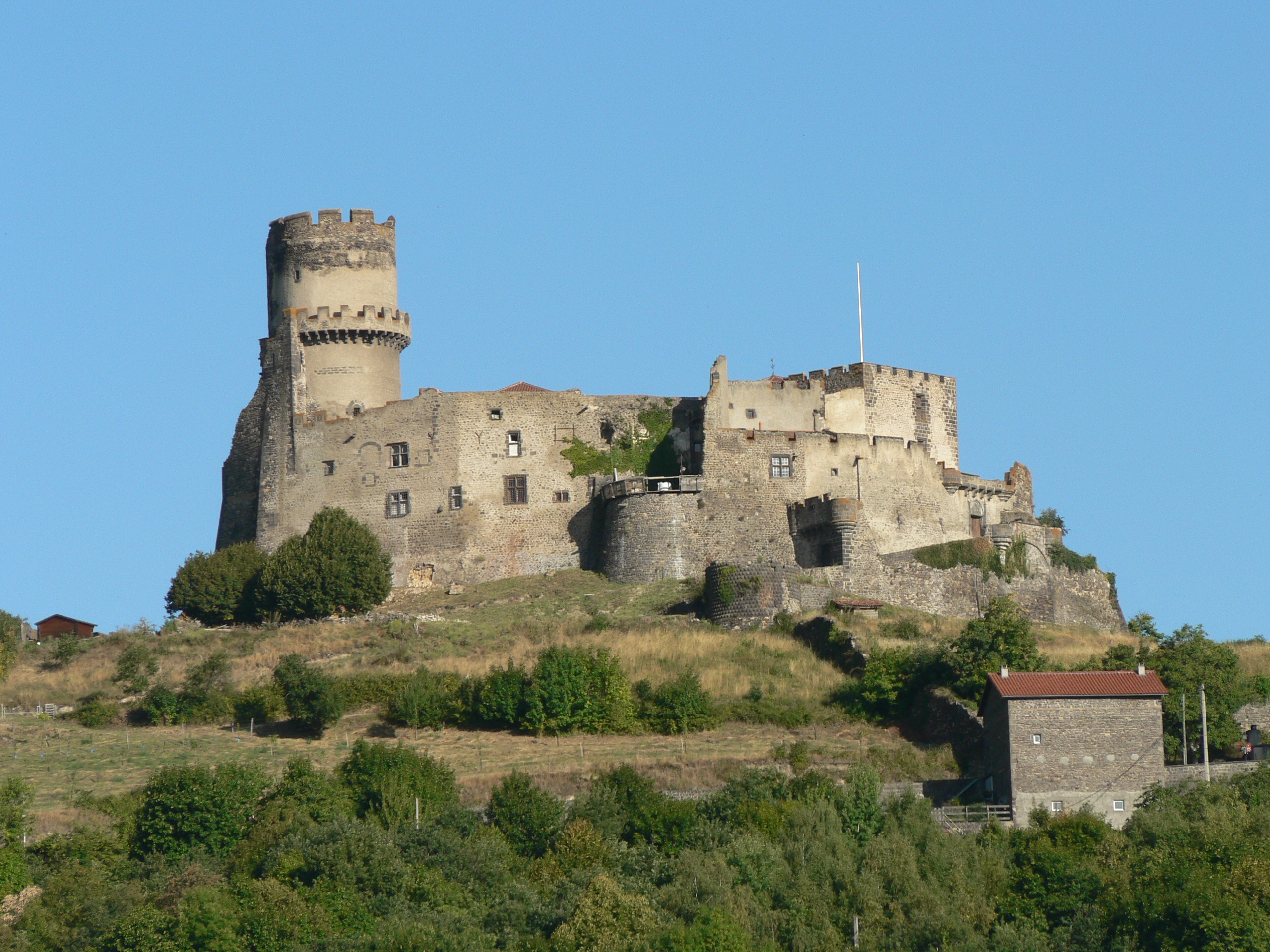 Château de Tournoël (Volvic, France)